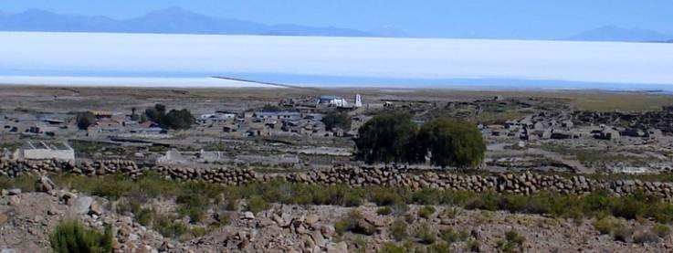 Tahua, vista general con el salar al fondo. Tahua es una localidad del sudoeste de Bolivia, cabecera municipal del municipio del mismo nombre, de la provincia de Daniel Campos, en el departamento de Potosí. Se encuentra a aproximadamente 200 km al oeste de la capital departamental, la ciudad de Potosí y a 120 km de Uyuni a travez del Salar del mismo nombre.